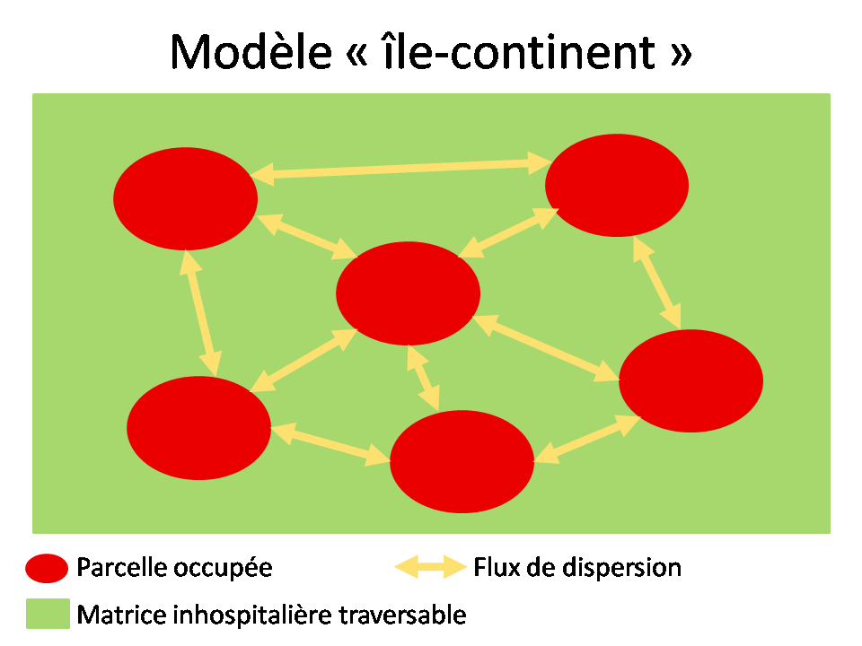 Modèle de dispersion biologique